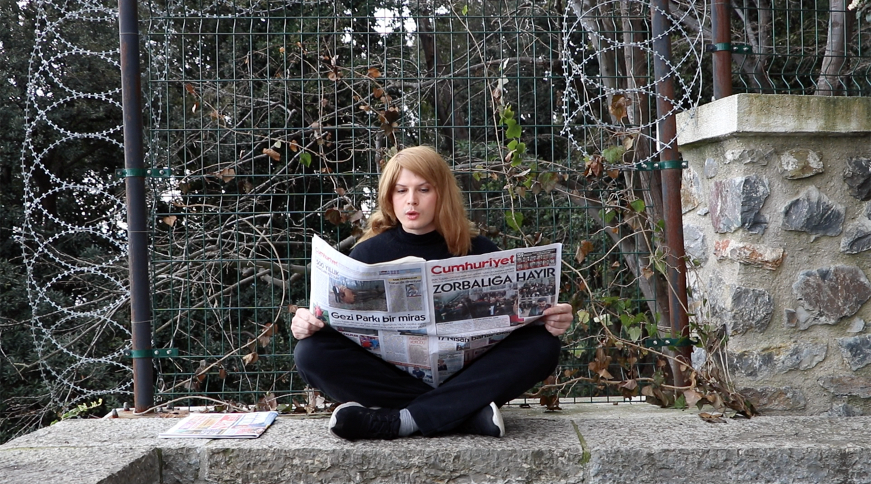 Während der Performance „Lecture“ liest der Künstler laut aus zwei verschiedenen türkischen Tageszeitungen vor. Dabei befindet sich Pelz direkt an einer Mauer, die zu dem deutschen Soldatenfriedhof in Istanbul gehört und an ein Grundstück grenzt, das im Besitz des türkischen Präsidenten Recep Tayyip Erdoğan ist. Das erste Blatt, „Star“, propagiert Erdogans Politik und wird von ihm mitfinanziert, während die zweite Zeitung, „Cumhuriyet“, eines der letzten Presseorgane ist, die Erdoğans Politik kritisch gegenübersteht. Ohne die Sprache zu beherrschen und den Inhalt der Artikel zu verstehen, liest Pelz die türkischen Worte, wie sie geschrieben stehen, wodurch aufgrund falscher Betonung und Lesefehlern eine eigene Lautsprache entsteht.